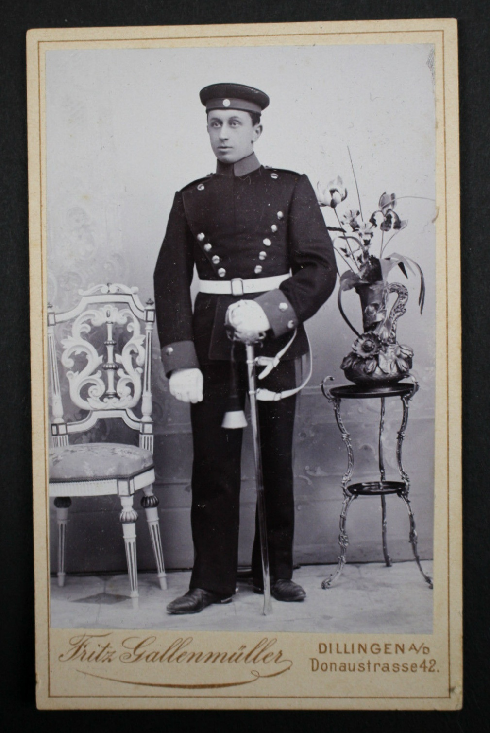 Portrait Photo - Chevauleger - Dillingen